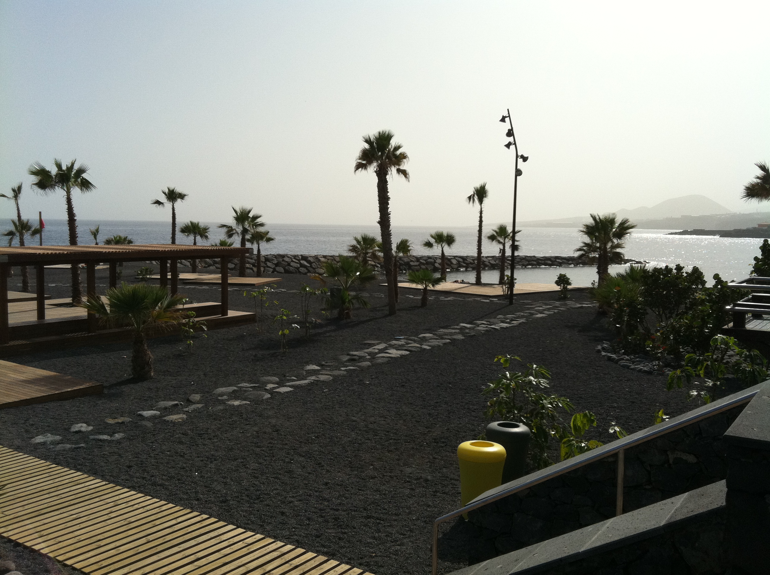 Zona recreativa en la playa de Puntagorda